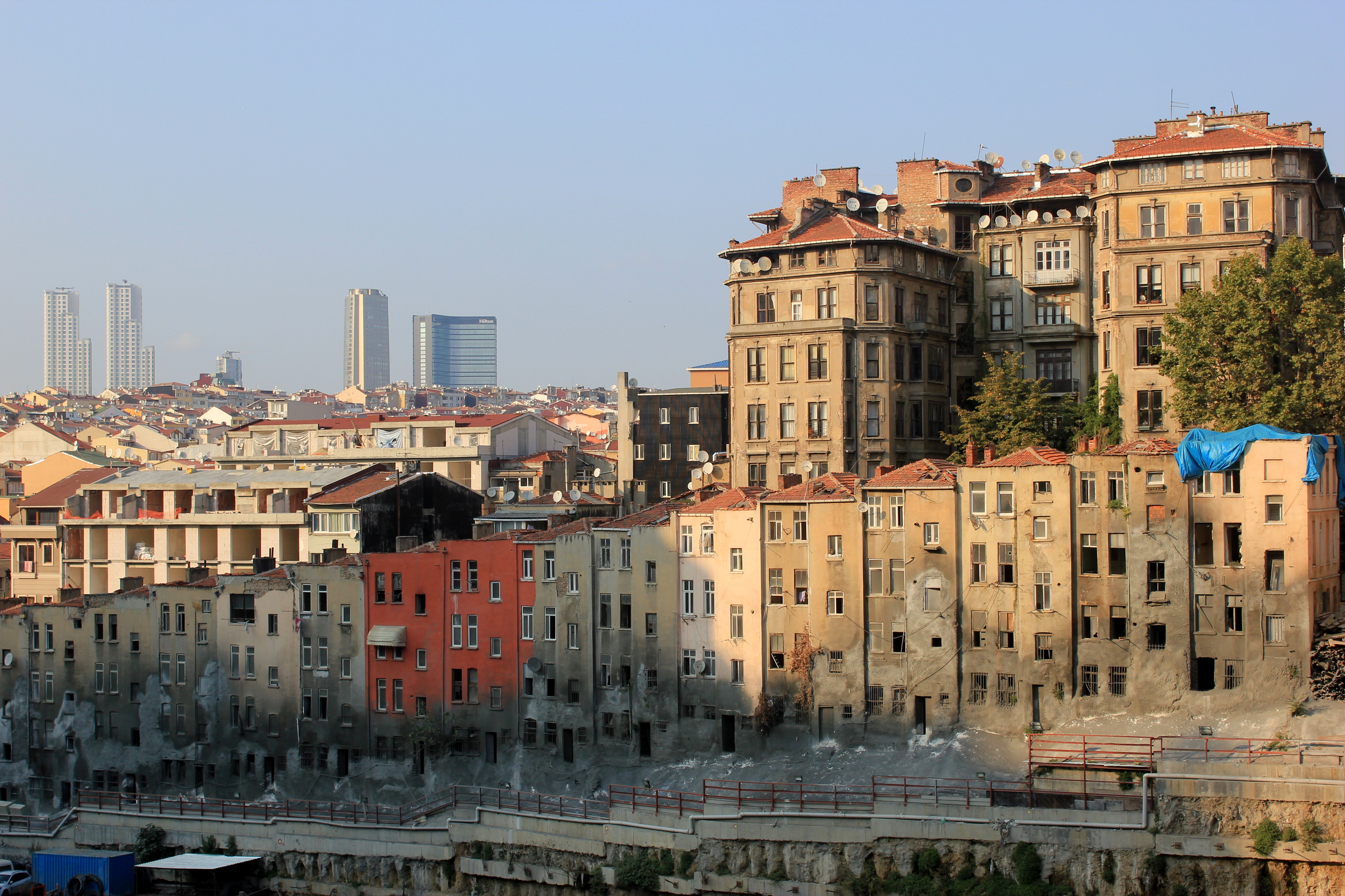 Baugrube in der Nähe des Taksim-Platzes in Istanbul.